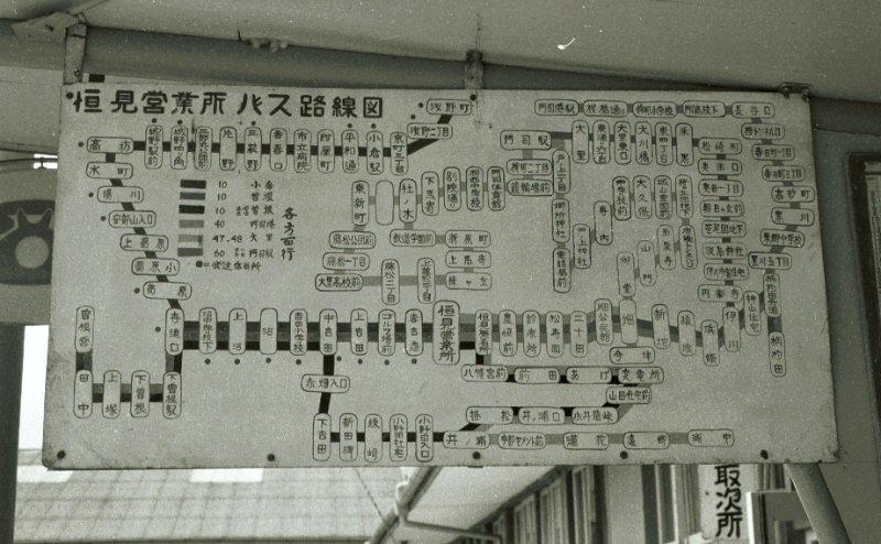 かなり過去に恒見営業所にて撮影